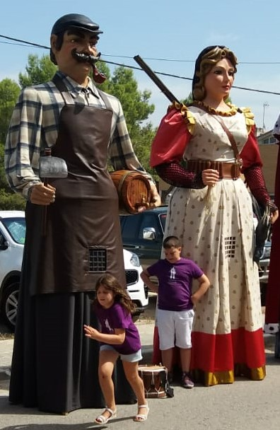 Els gegants nous d'Abrera, Pere i Roser, a la trobada de La Beguda Alta, 2/9/2019.